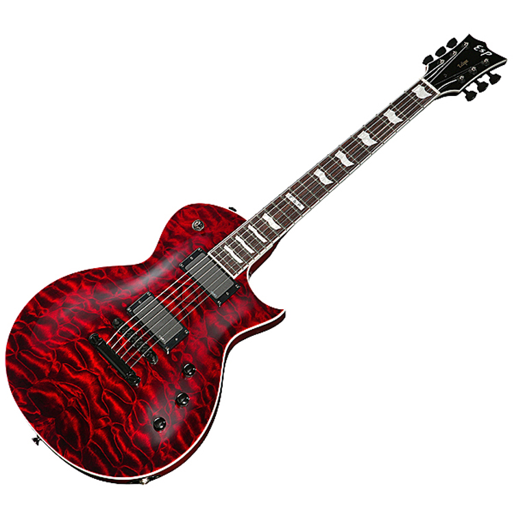 Artista Independiente